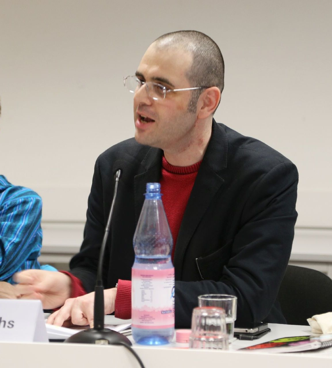 «Wie endlich alles anders wird» 10:15 Uhr Kommunismus für Erwachsene und Kinder ab 9 mit Musik. Mit Bini Adamczak Wie weiter mit Blockupy? 14:30 Uhr Organisierung und Protest gegen Krise und Prekarität in Europa. Mit Thomas Seibert, Werner Rätz, Jana Seppelt und Moritz Warnke Wie über Zukunft sprechen? Die Notwendigkeit einer radikalen ökosozialistischen Perspektive 17 Uhr Mit Elmar Altvater und Raul Zelik Digitale Revolution? Versuch eines realistischen Blicks auf den digitalen Wandel 19:30 Uhr Mit Christian Fuchs, Halina Wawzyniak, Anke Domscheit-Berg, Julia Schramm Berlin, 25.4.2015 Im Rahmen der Linken Woche der Zukunft